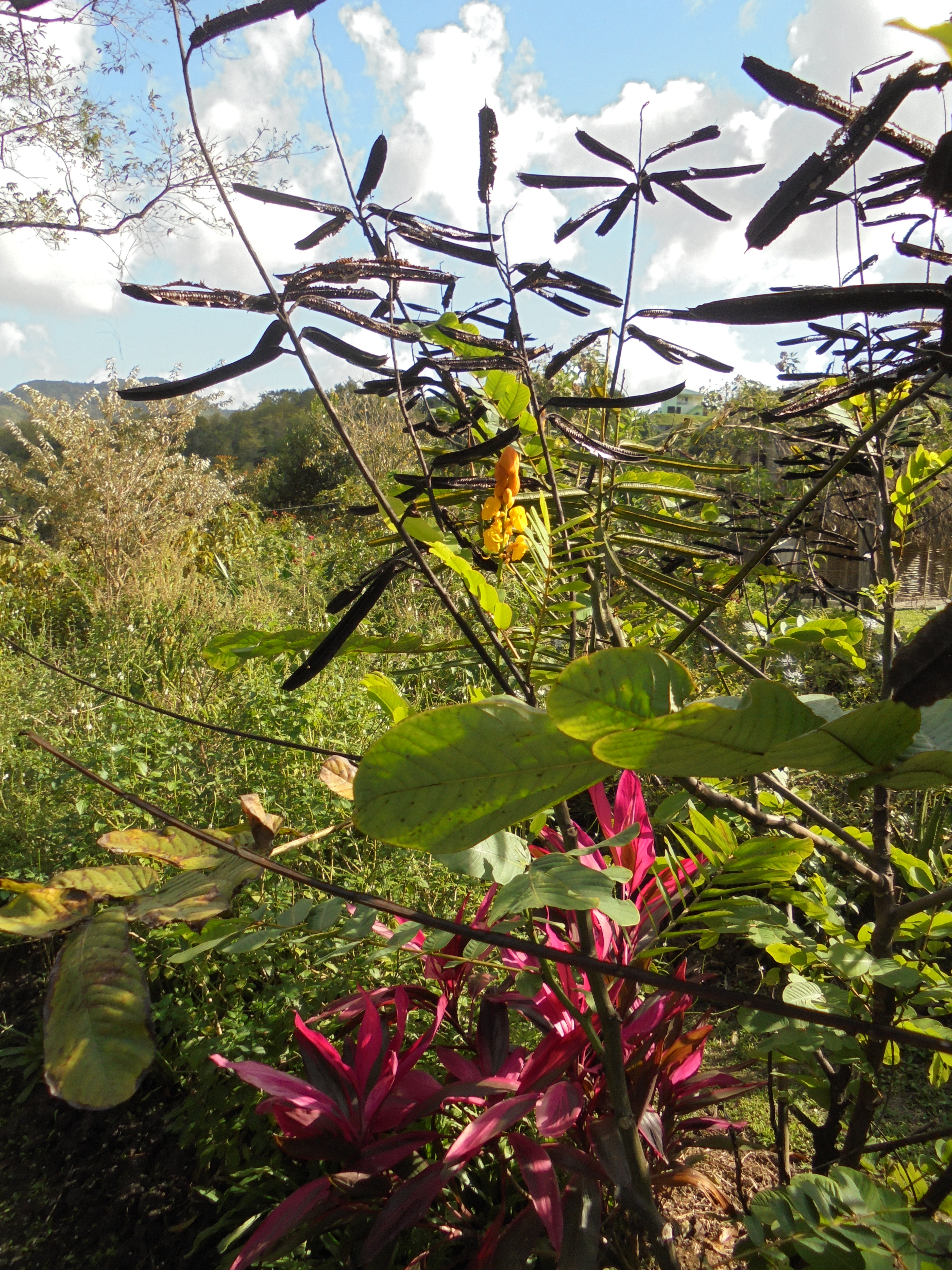 Fleurs et gousses de Senna alata ou Cassia alata (dartrier). Martinique